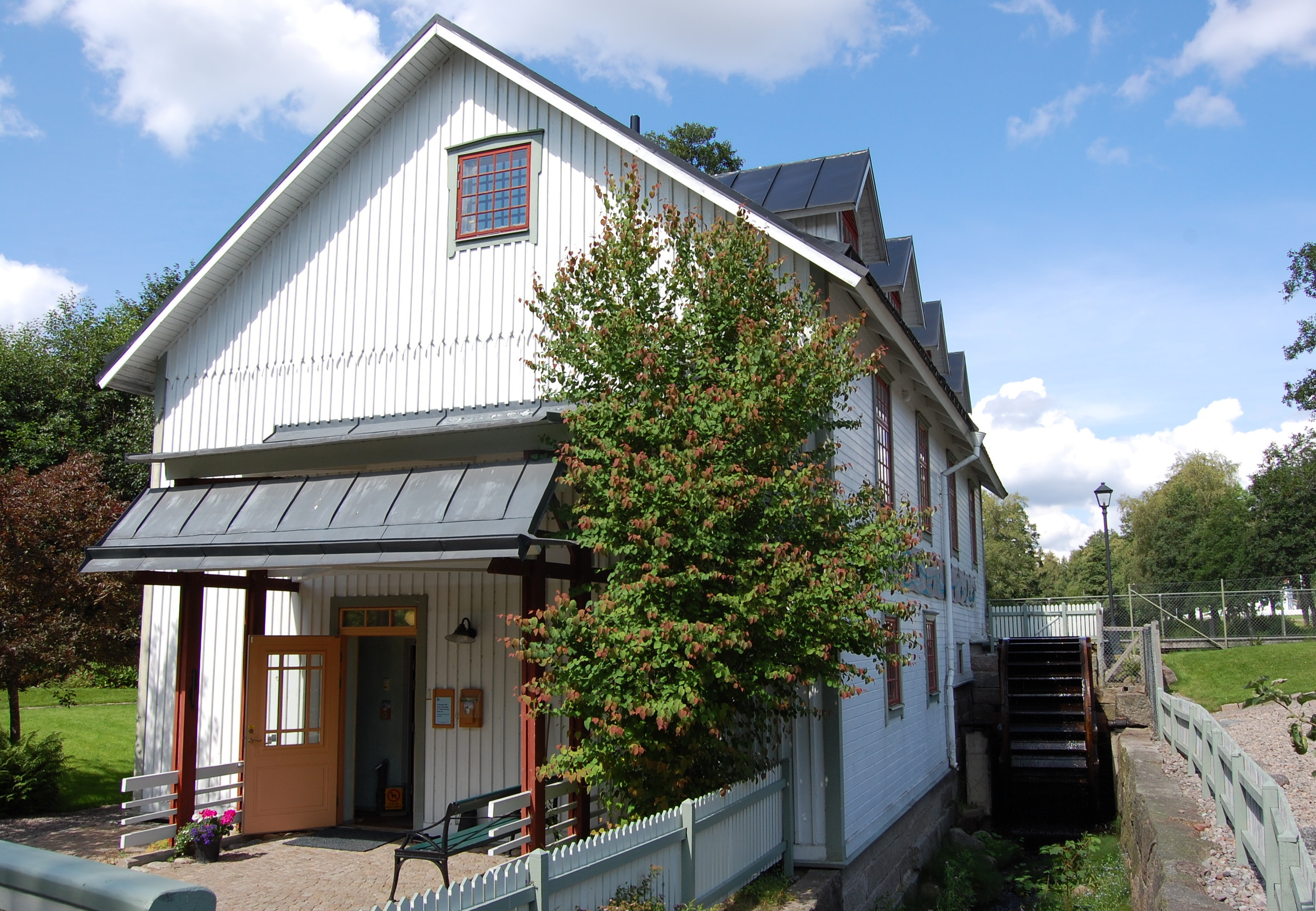 Mühlengebäude auf dem Gelände des Ekomuseum Eman